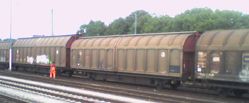 Schiebewandwagen der DB mit 46,4m² Ladefläche und verschieden hohen Wagenkästen für unterschiedliche Lichtraumprofile: Hbbillns310 (vorn) und Hbbillns311 (dahinter) German (DB) sliding roof covered vans with 46.4 sq. m. of loading area and various body heights for different rail gauges. Hbbillns310 class.